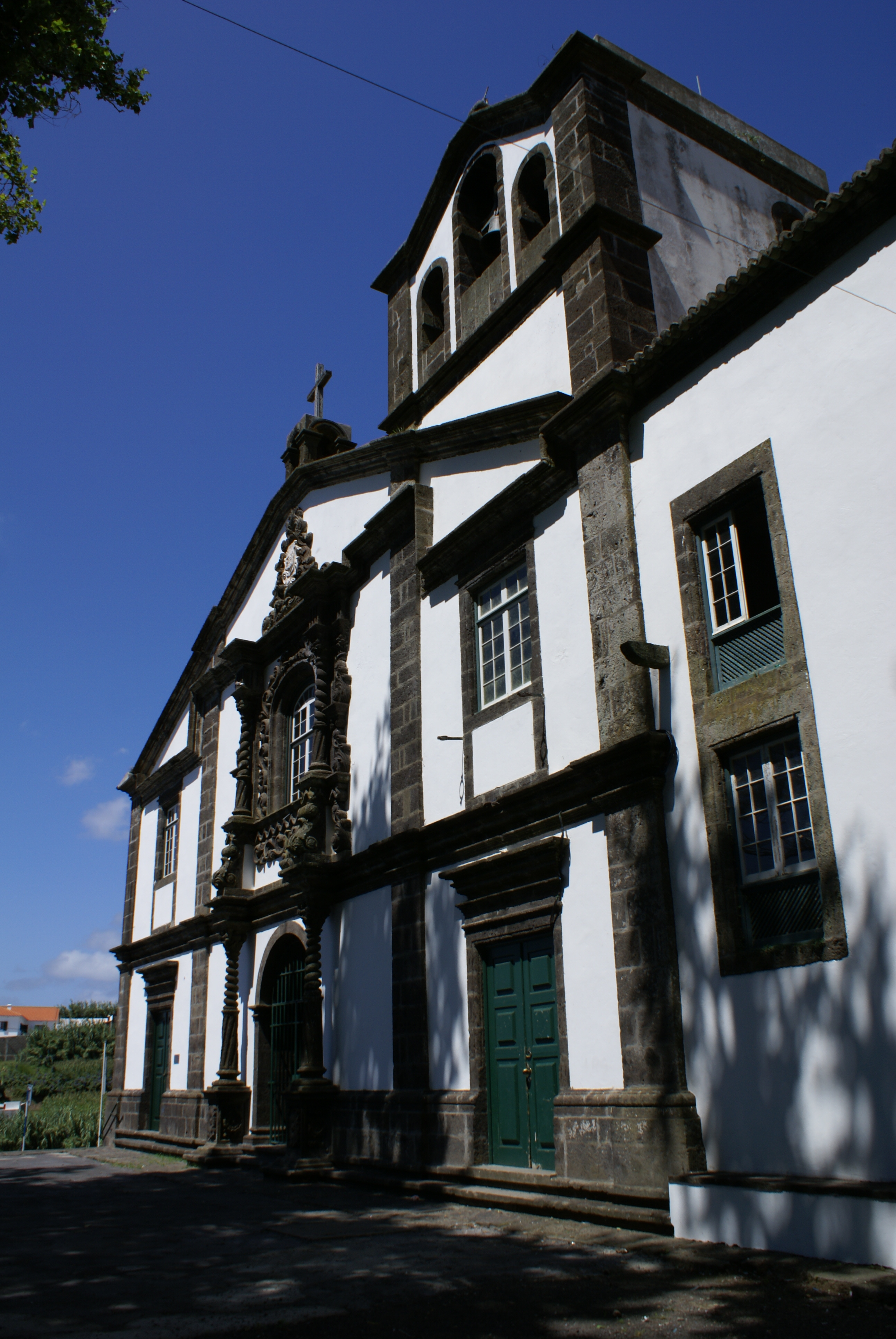 Igreja de Nossa Senhora do Rosário, nave central, Lagoa, ilha de São Miguel, Açores